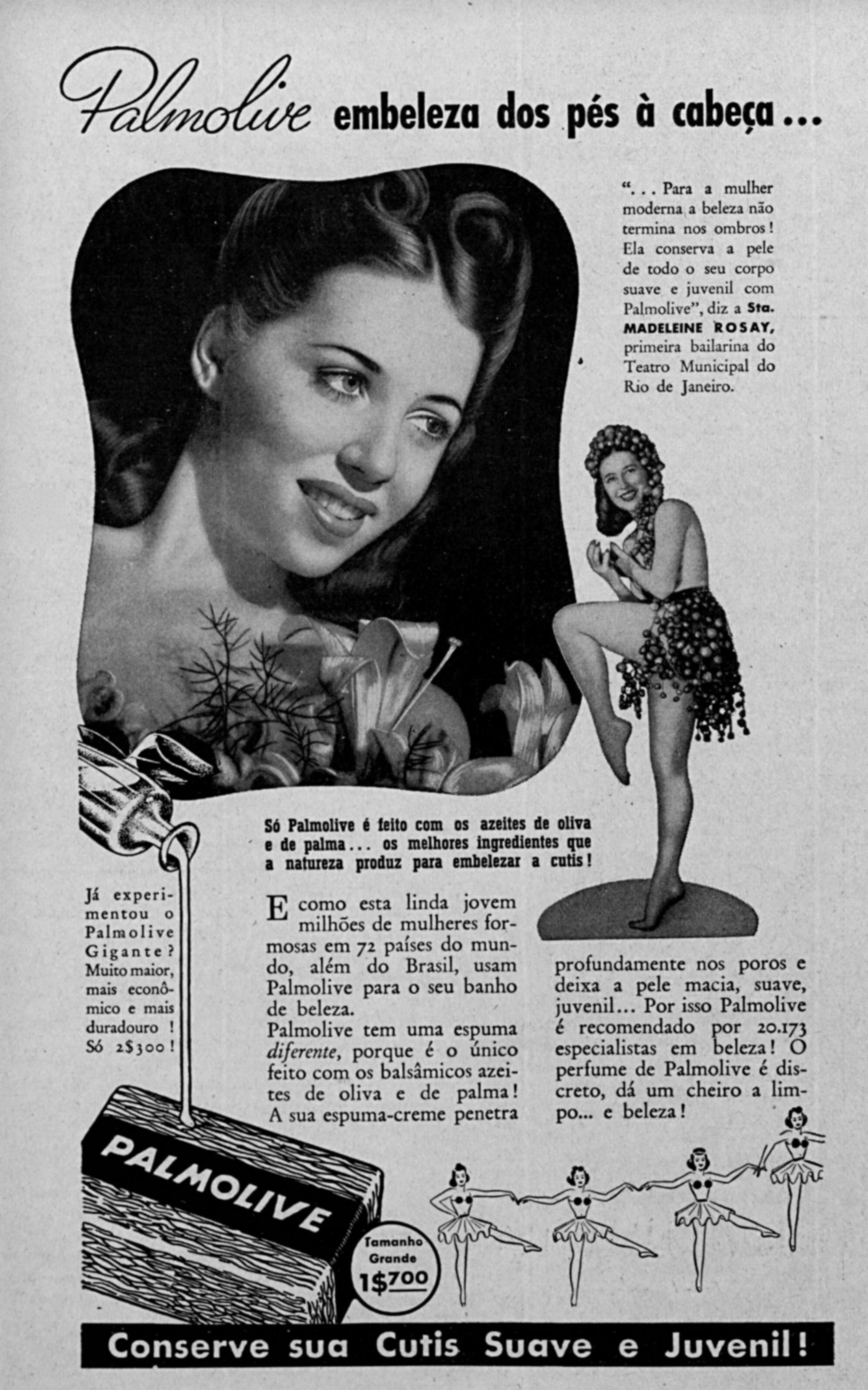 A primeira-bailarina do Teatro Municipal do Rio de Janeiro, Madeleine Rosay, em propaganda do sabonete Palmolive, em 1942.